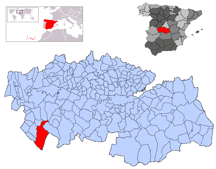 SevillejC de la Jara en la provincia de Toledo